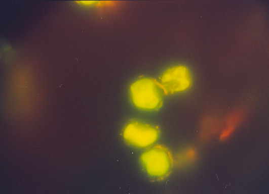 Sporen von Rostpilzen. Puccinia striiformis Westend.Fluoreszenzmikroskopie,Acridinorange-Färbung